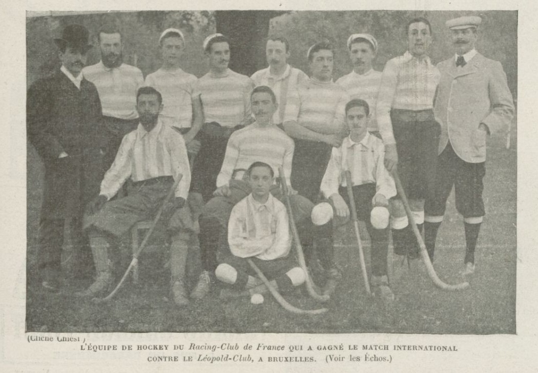 Equipe du RCF lors d'un match face à Bruxelles en 1898